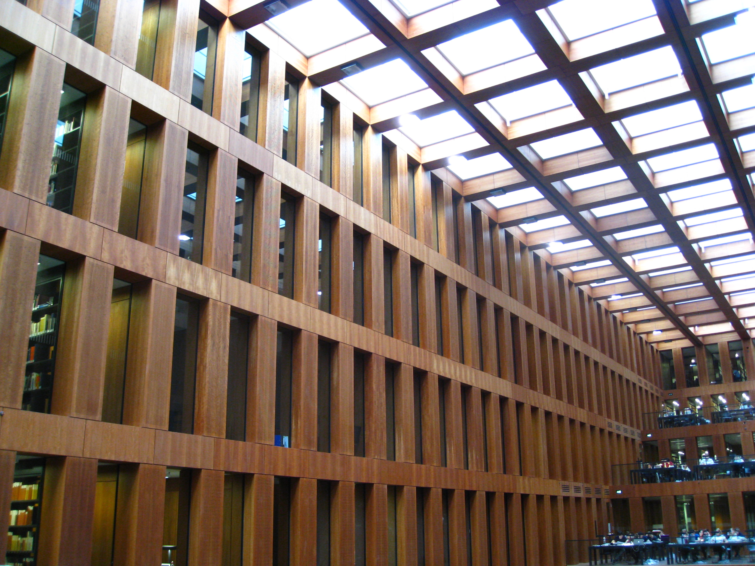 Der große Lesesaal des Grimm-Zentrums von HU Berlin.